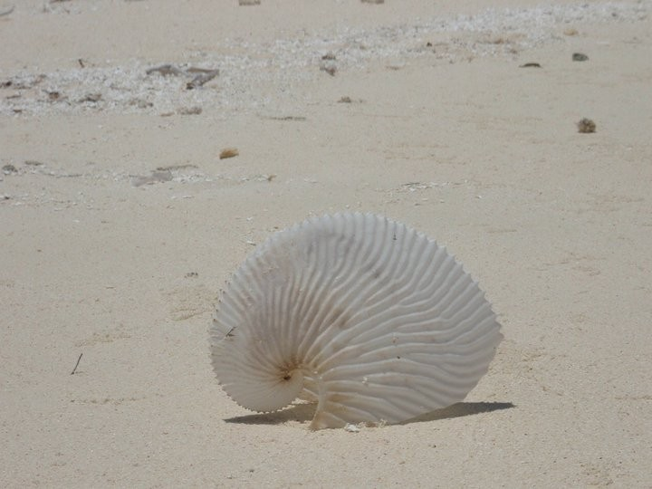 Isla la Tortuga Concha de Argonauta argo, Dependencias Federales - Venezuela.